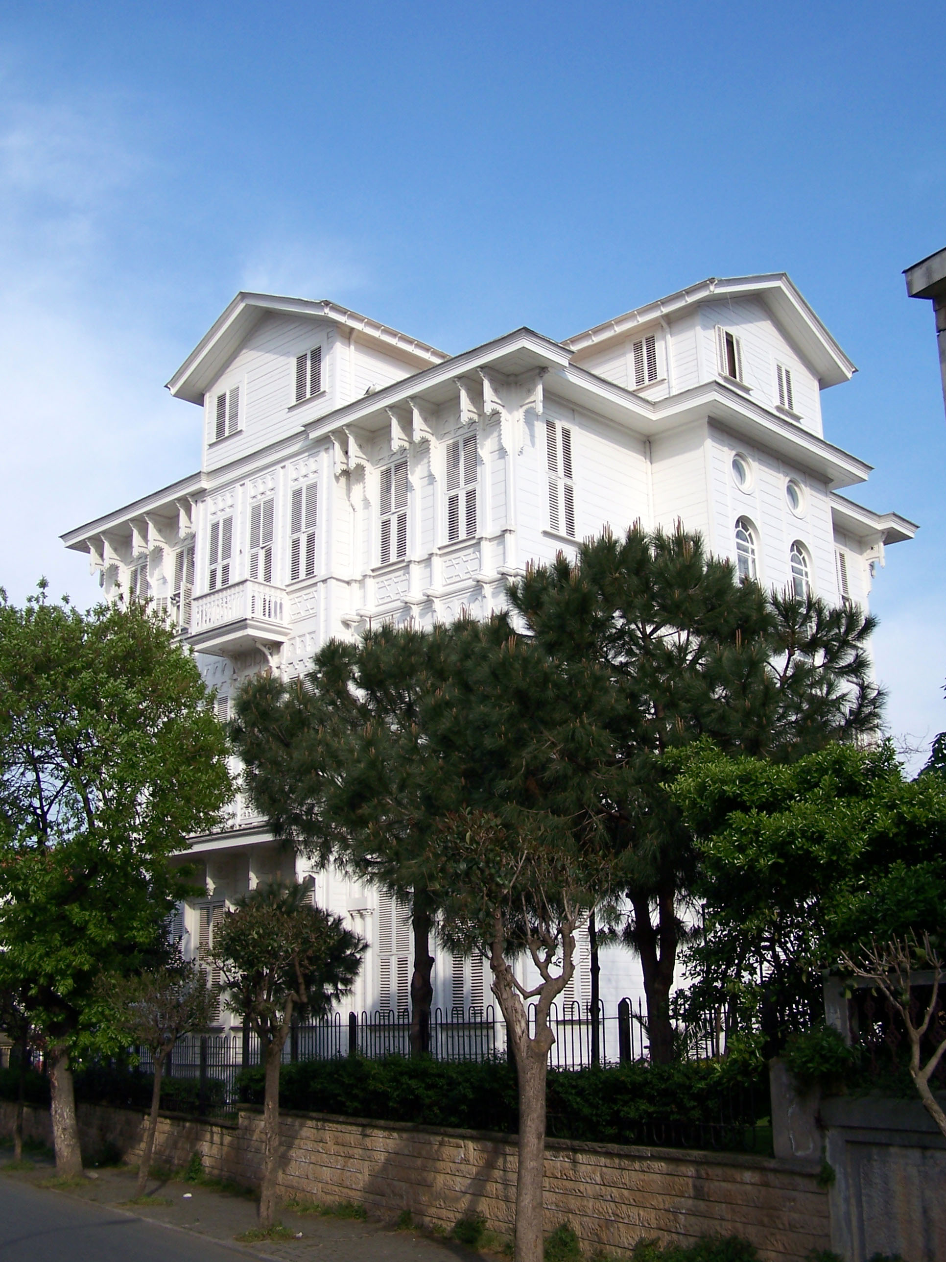 Typical house in Büyükada, Turkey